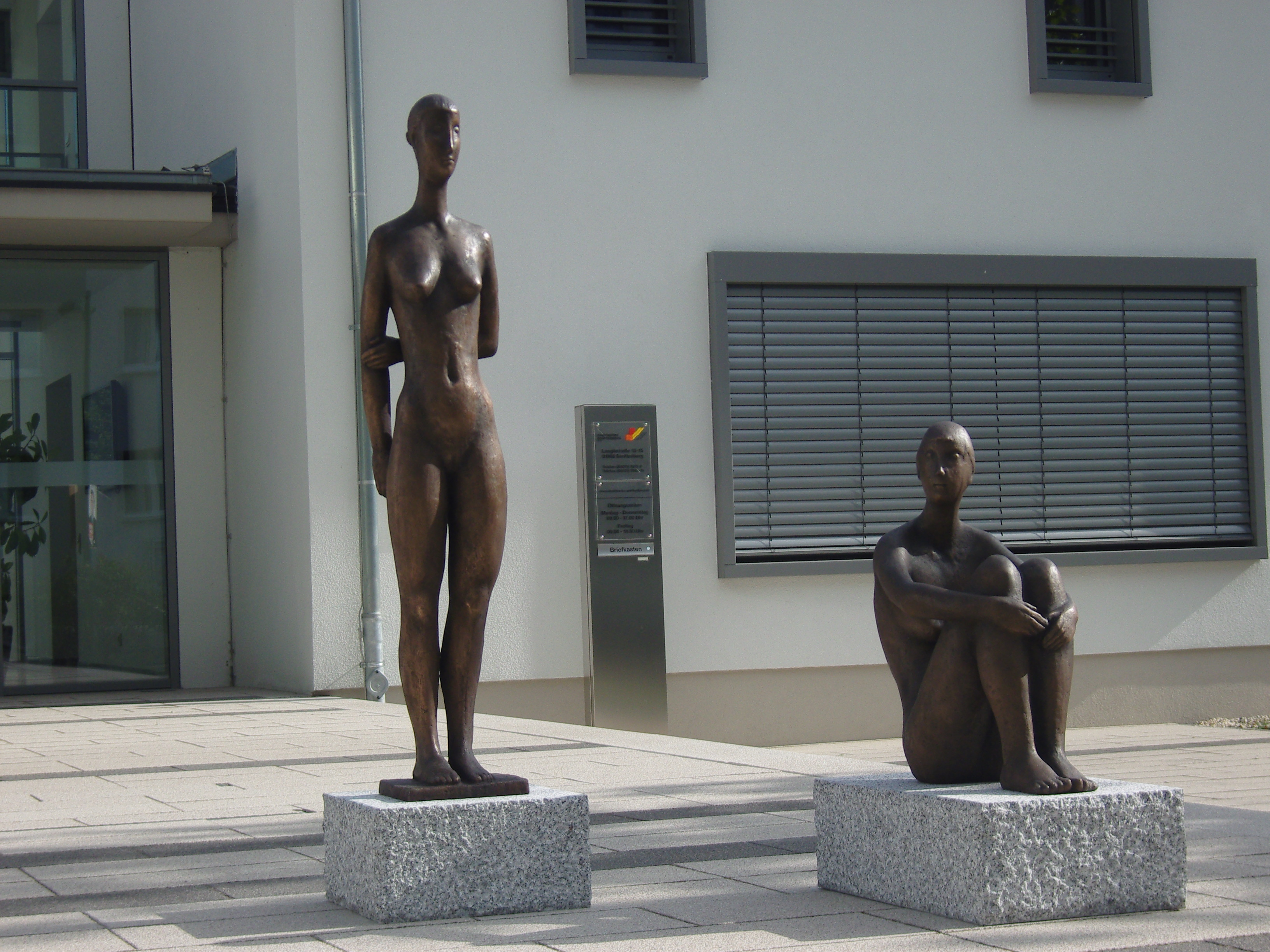 Plastiken "Hockende" und "Stehende" von Jürgen von Woyski in der Laugkstraße in Senftenberg